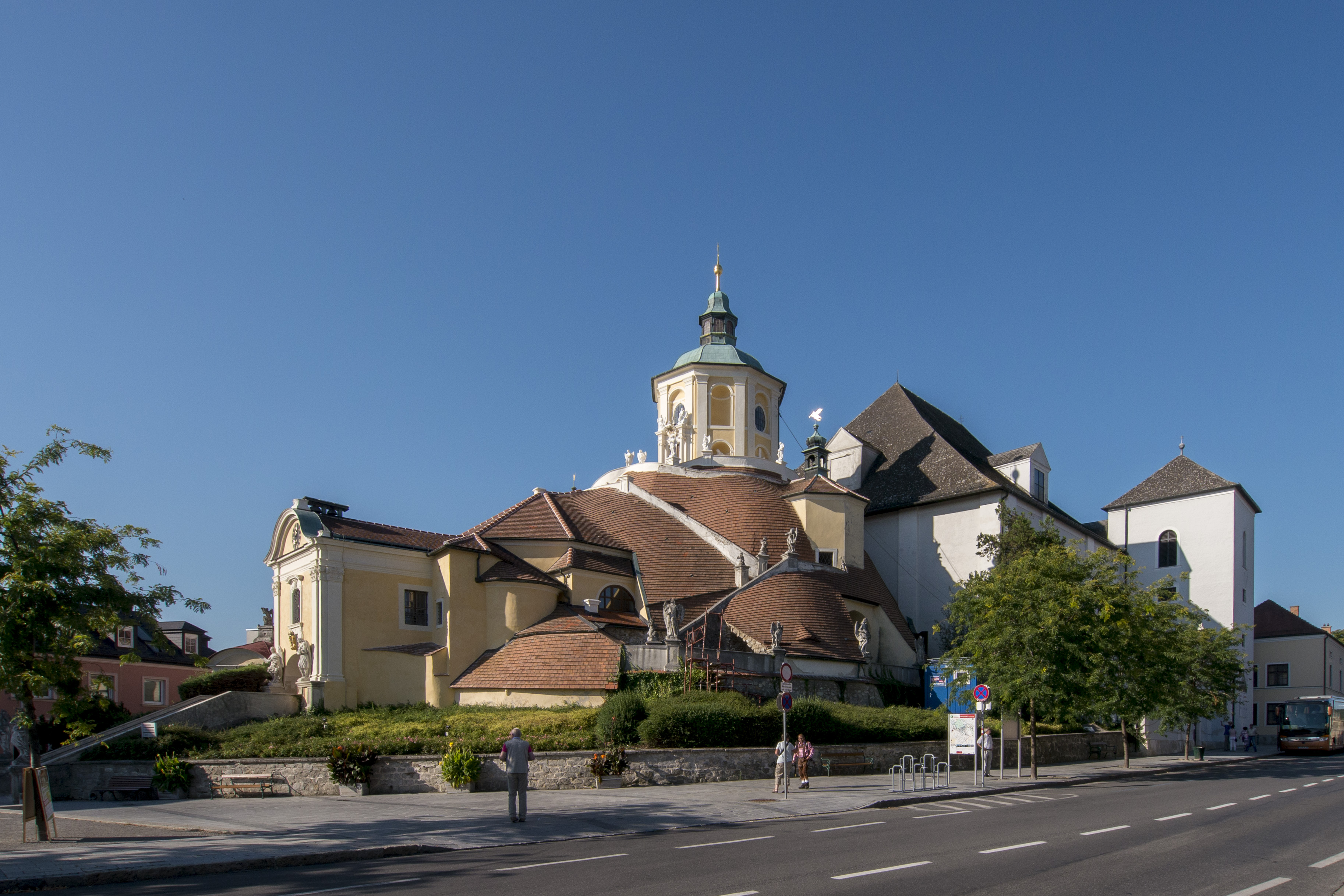 Haydnkirche, Eisenstadt